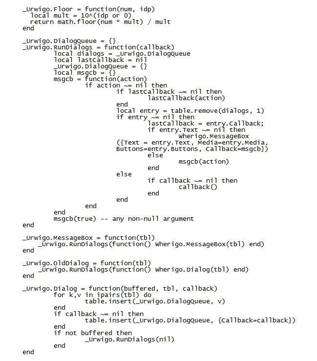 Programmierung_WIG_alsterdrache_GC45K1D_04